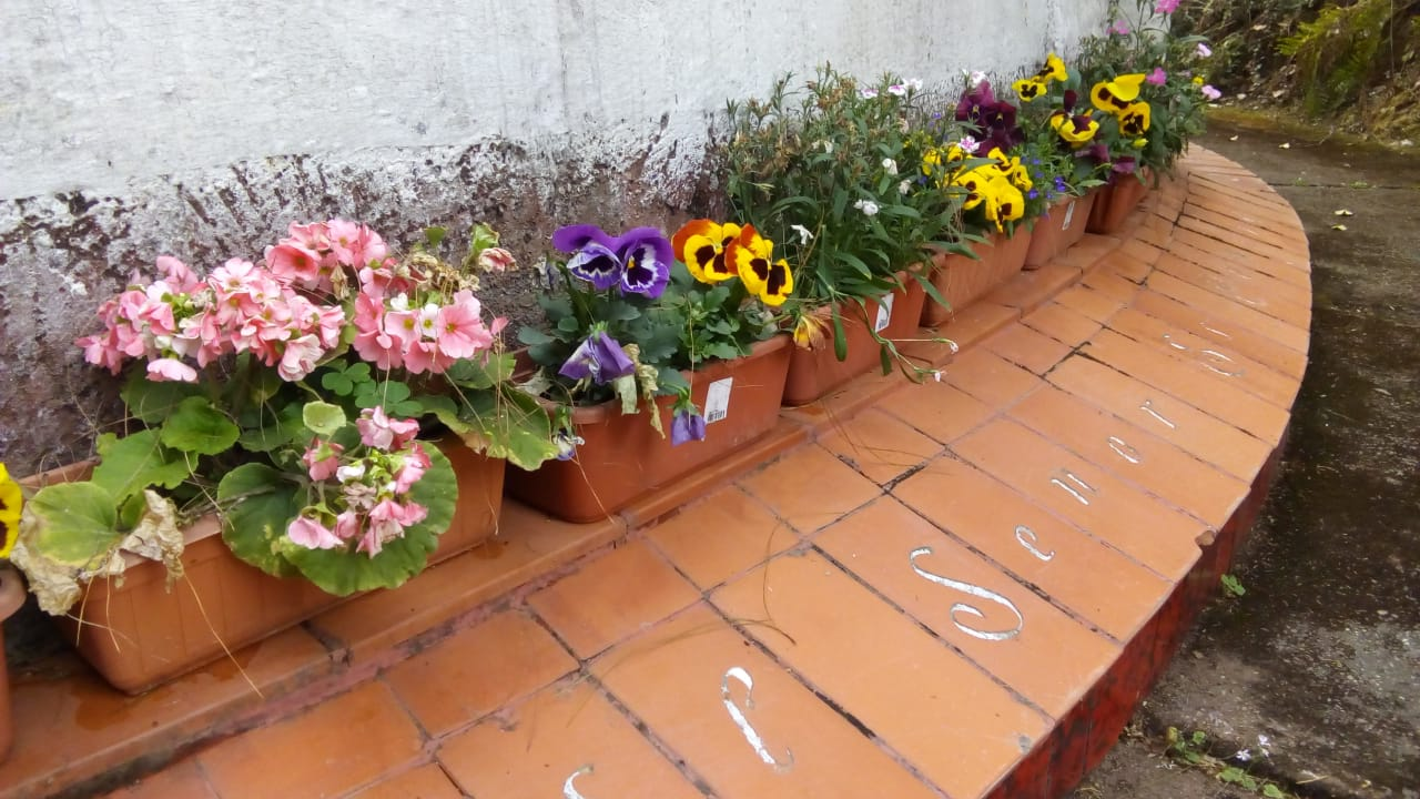 Cantero de la Capilla Comunidad El Arca,Guerrero, Jujuy